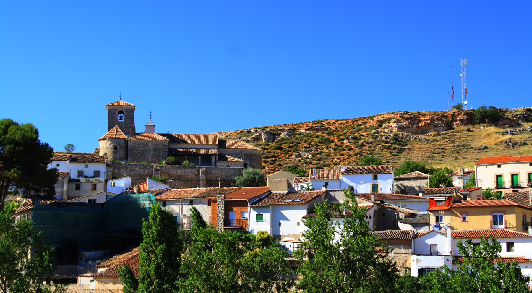 Hueva Provincia de Guadalajara Castilla-La Mancha España